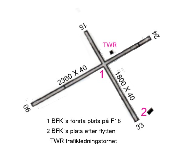 BFKs två platser på F18 1973